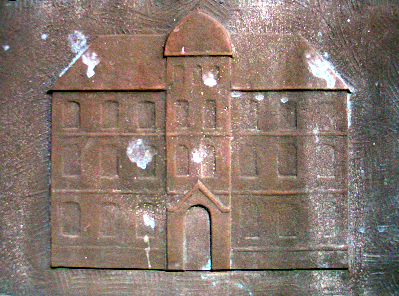 Vereinfachte Abbildung eines der 1971 zugunsten des Berufsschulzentrums in Hannover abgerissenen Gebäude der ehemaligen Ohestraße 8 und 9 auf der Gedenktafel am Mahnmal zur Erinnerung an jüdisches Leben ...